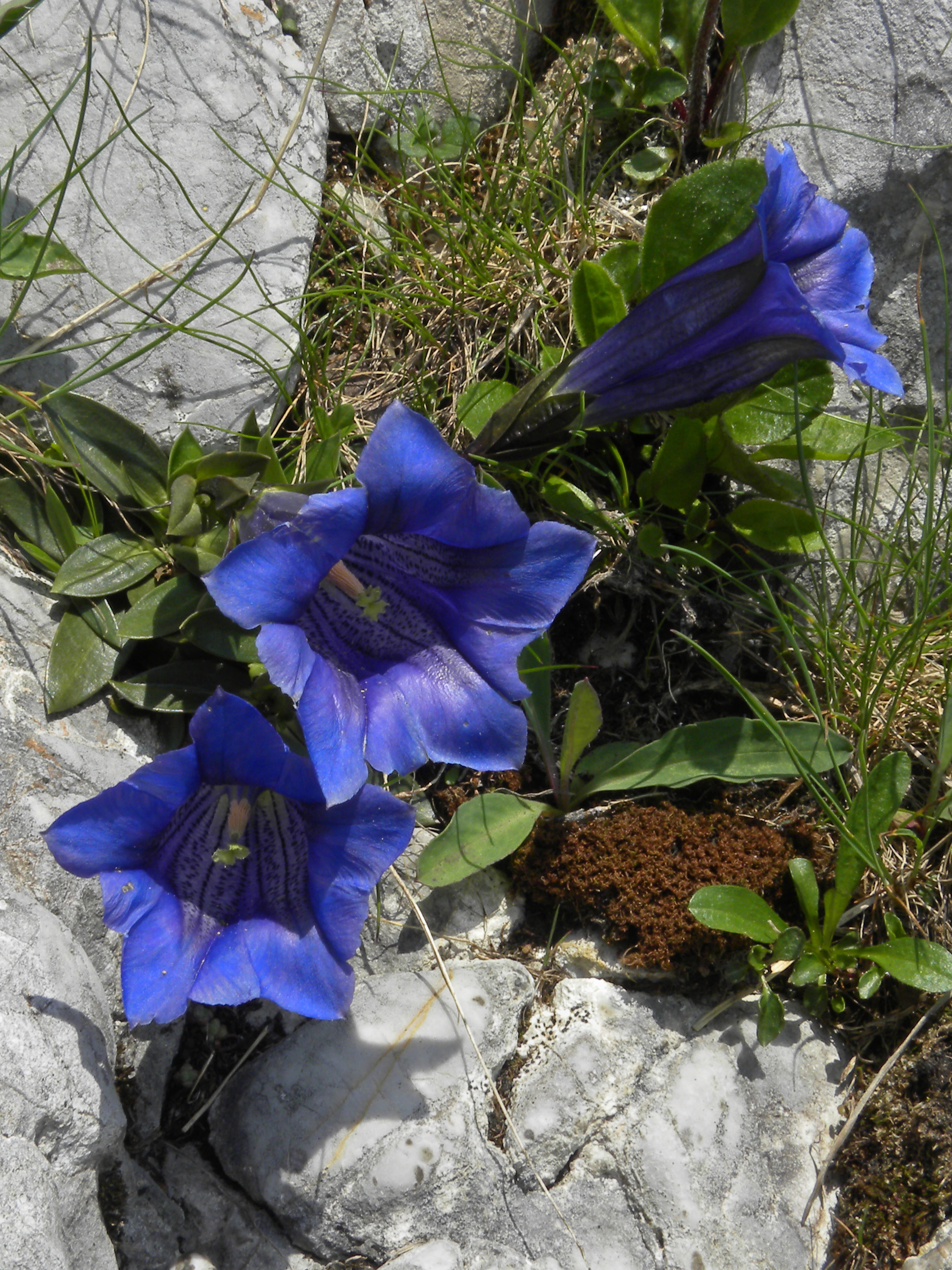 Ein Kalk-Glocken-Enzian (Gentiana clusii), auch Stängelloser Enzian genannt, auf der Rax.